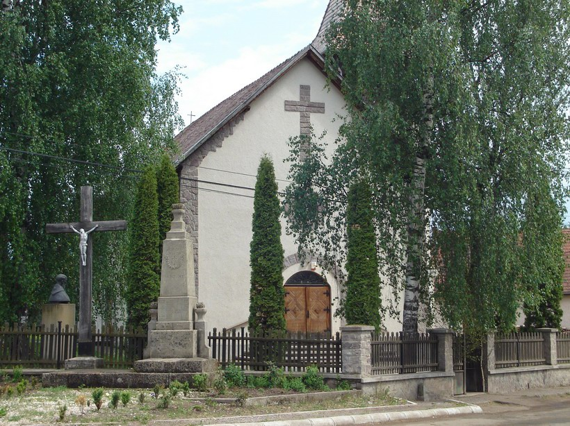 Kezdialmás temploma